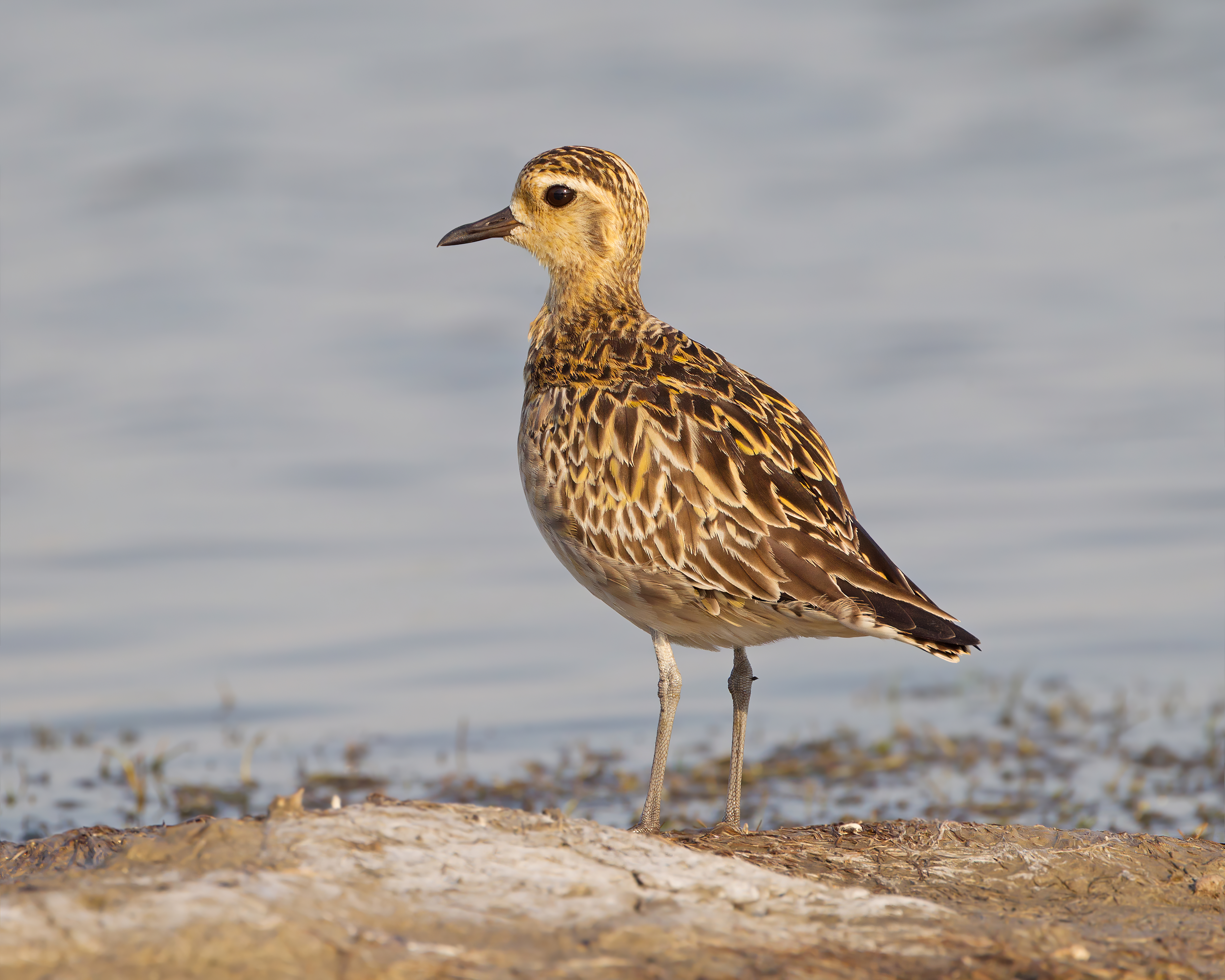 Pacific Golden Plover (Pluvialis fulva), Laem Pak Bia, Petchaburi, Thailand